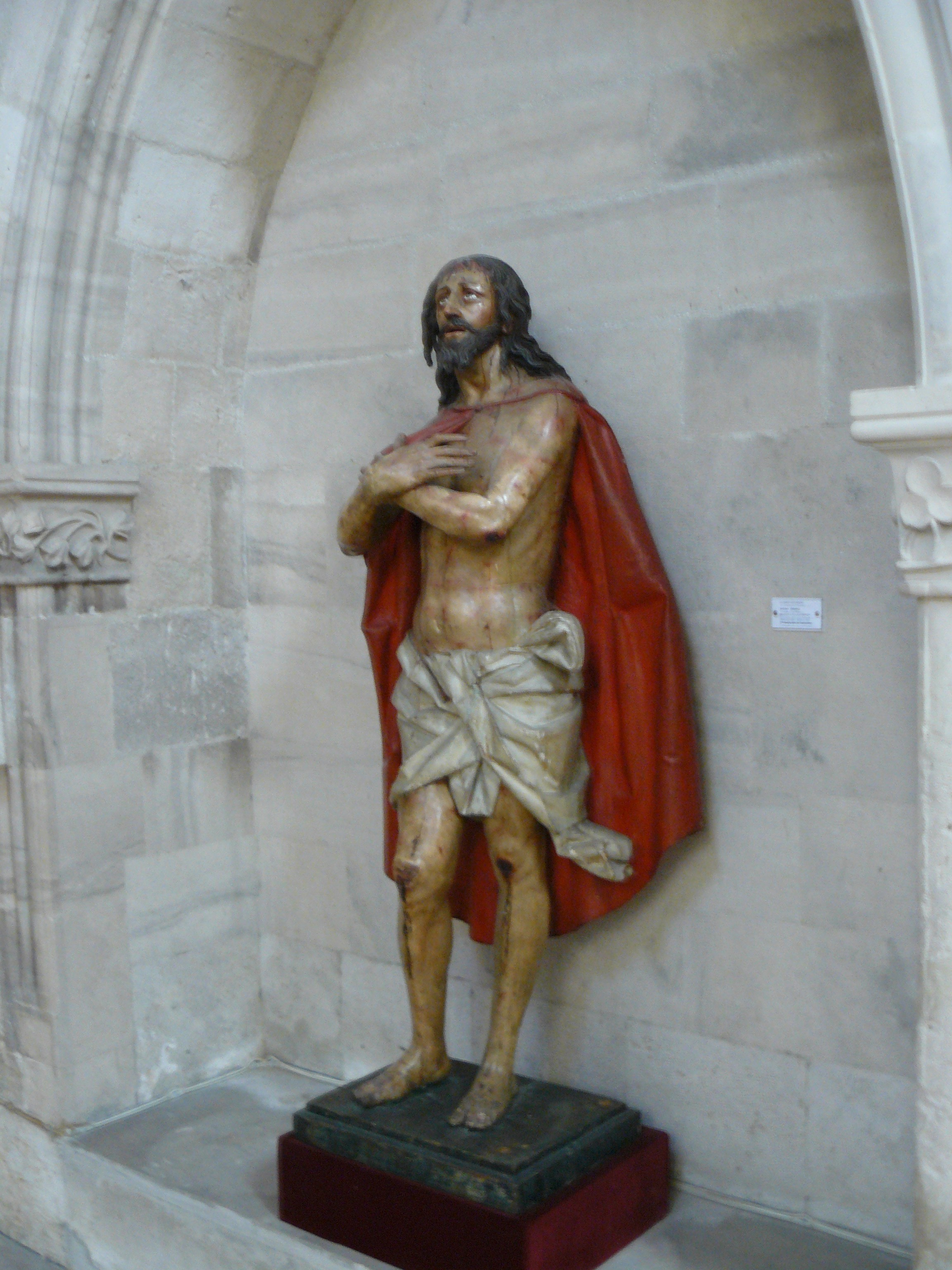 Catedral de Valladolid , Valladolid.